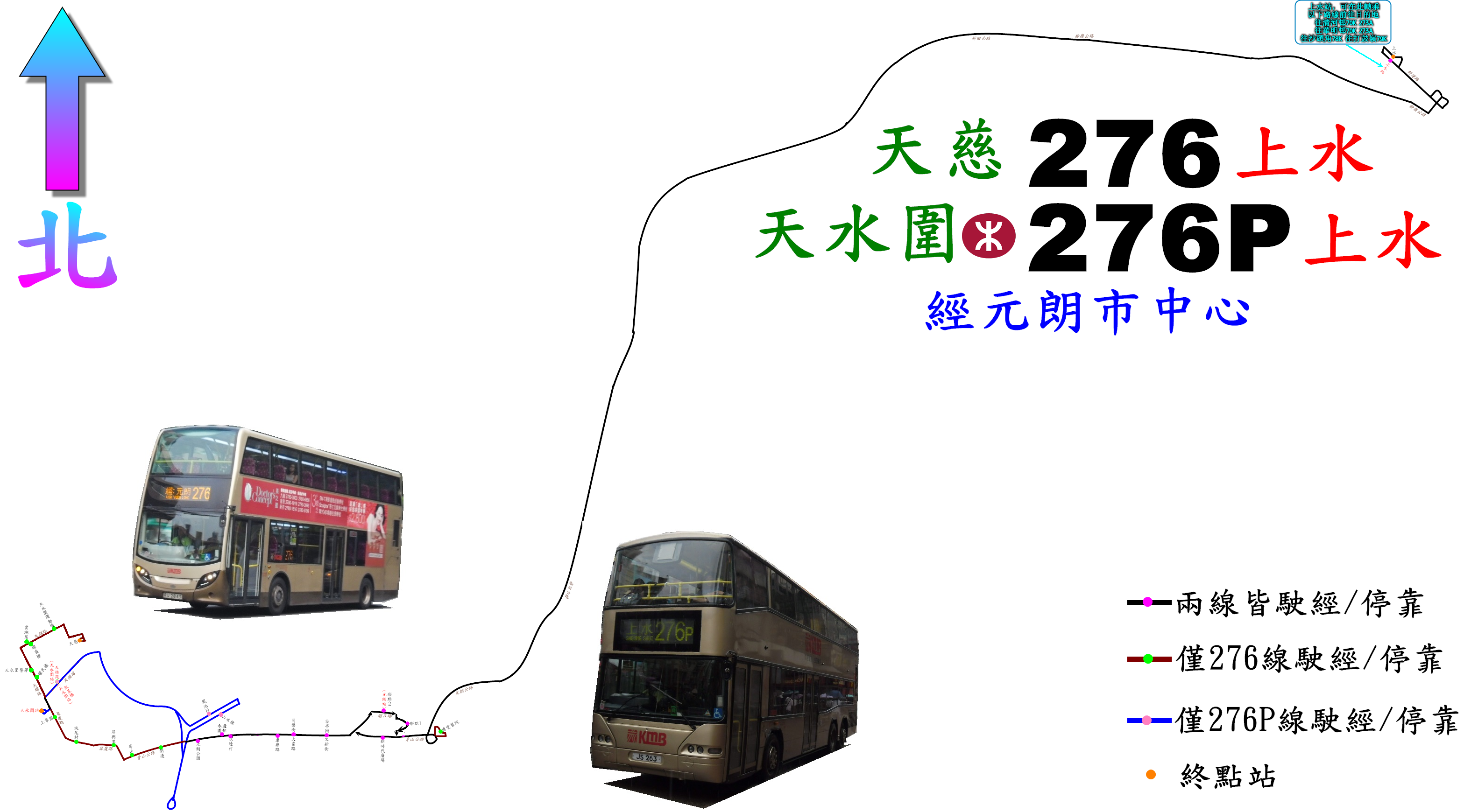 中文（香港）: 九巴276/276P線的走線圖